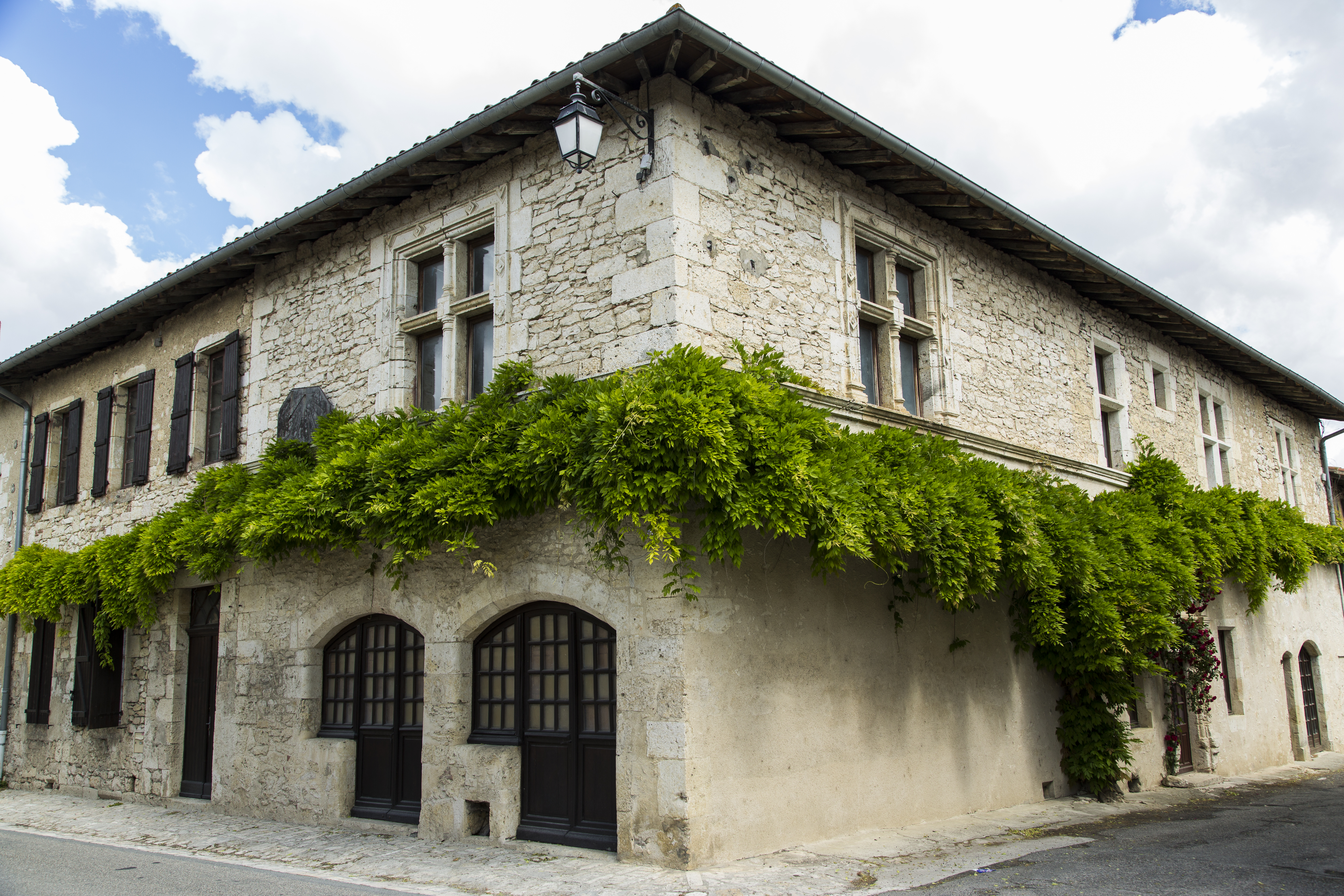 Maison Salluste